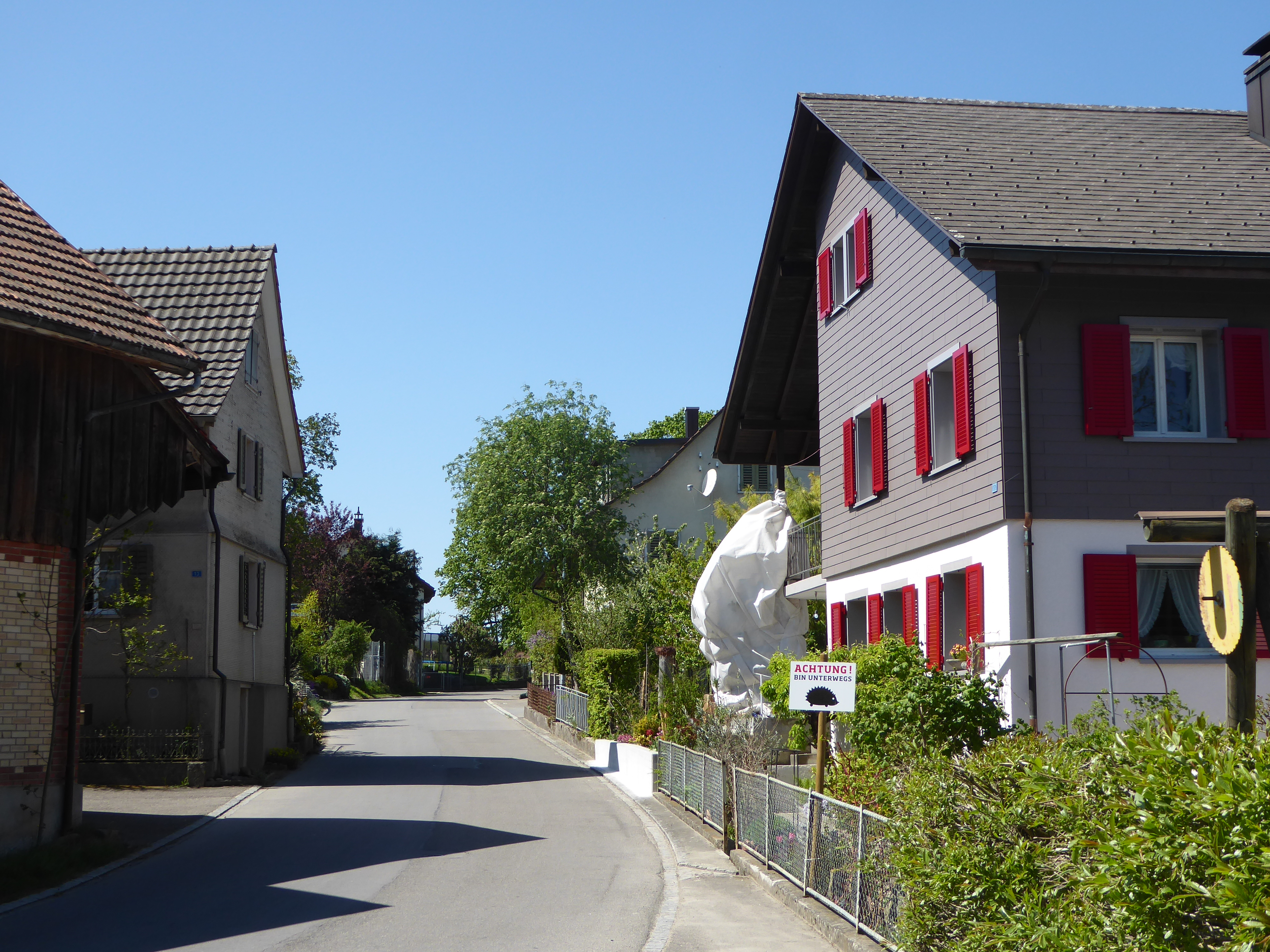 Toos TG